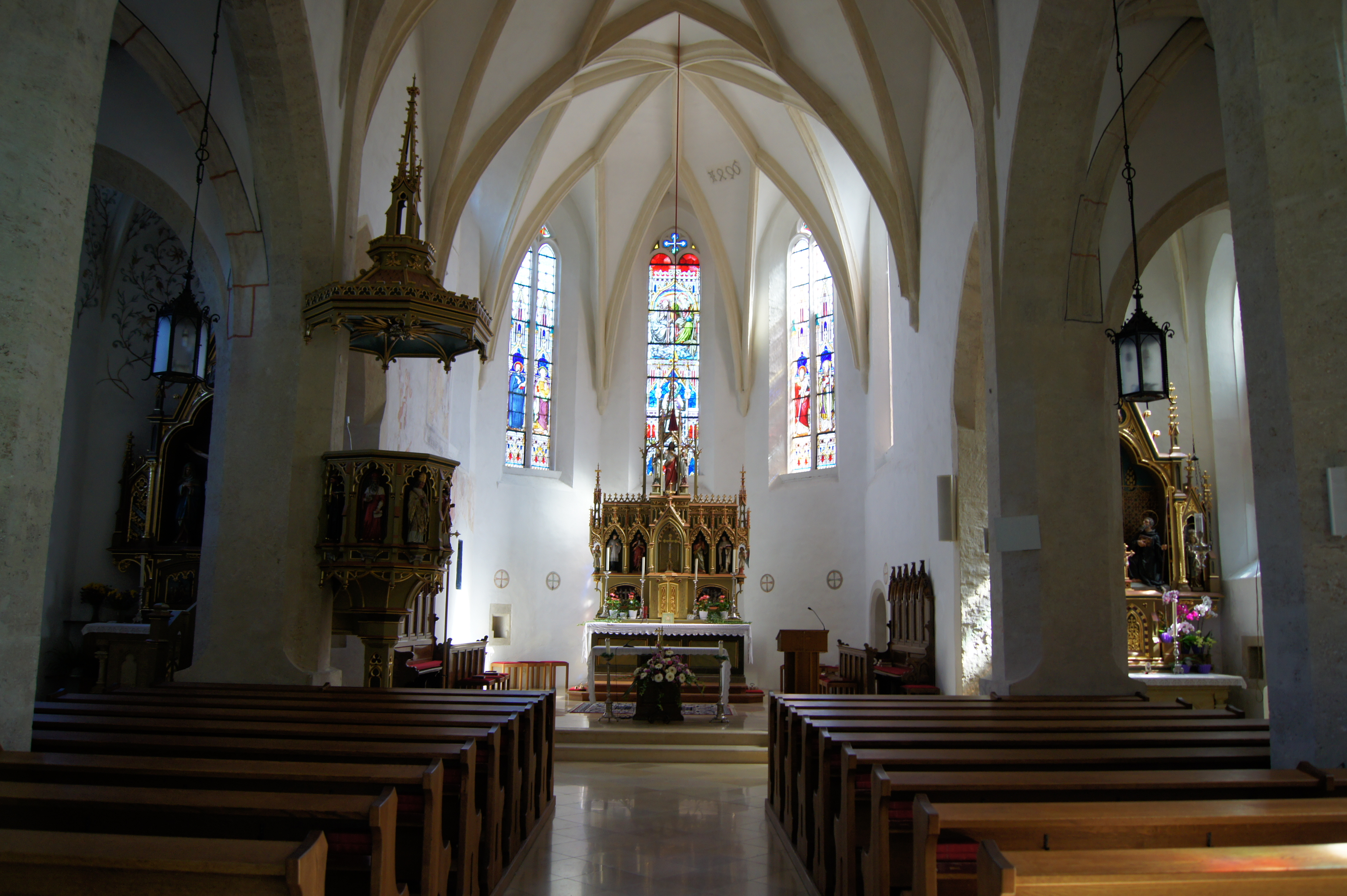 Kath. Pfarrkirche hl. Laurenz